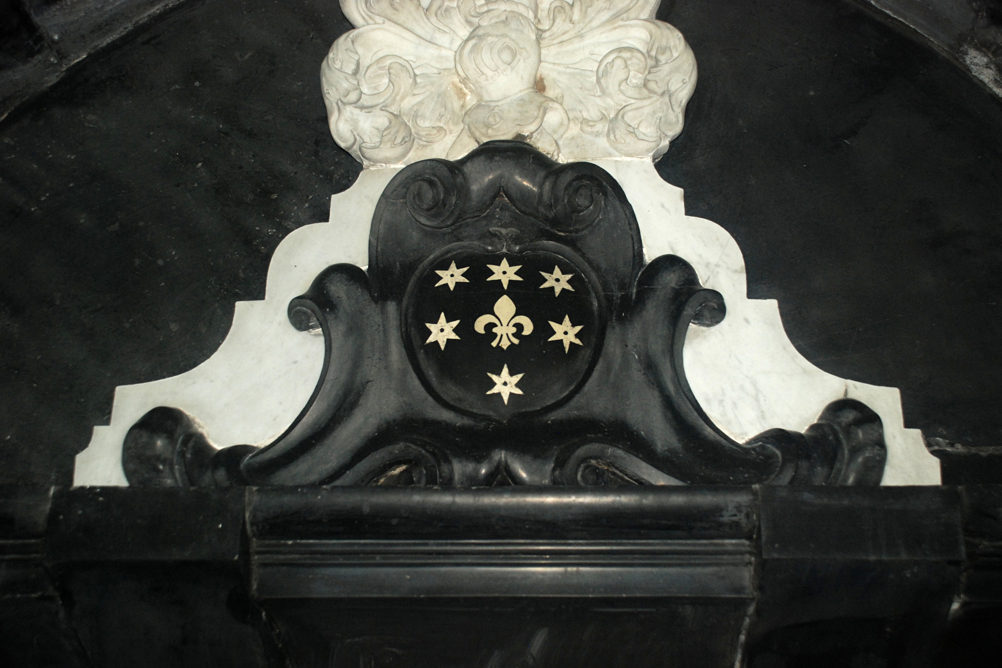 Belgique - Brabant wallon - Église de Court-Saint-Étienne - Enfeu de Louis de Provins